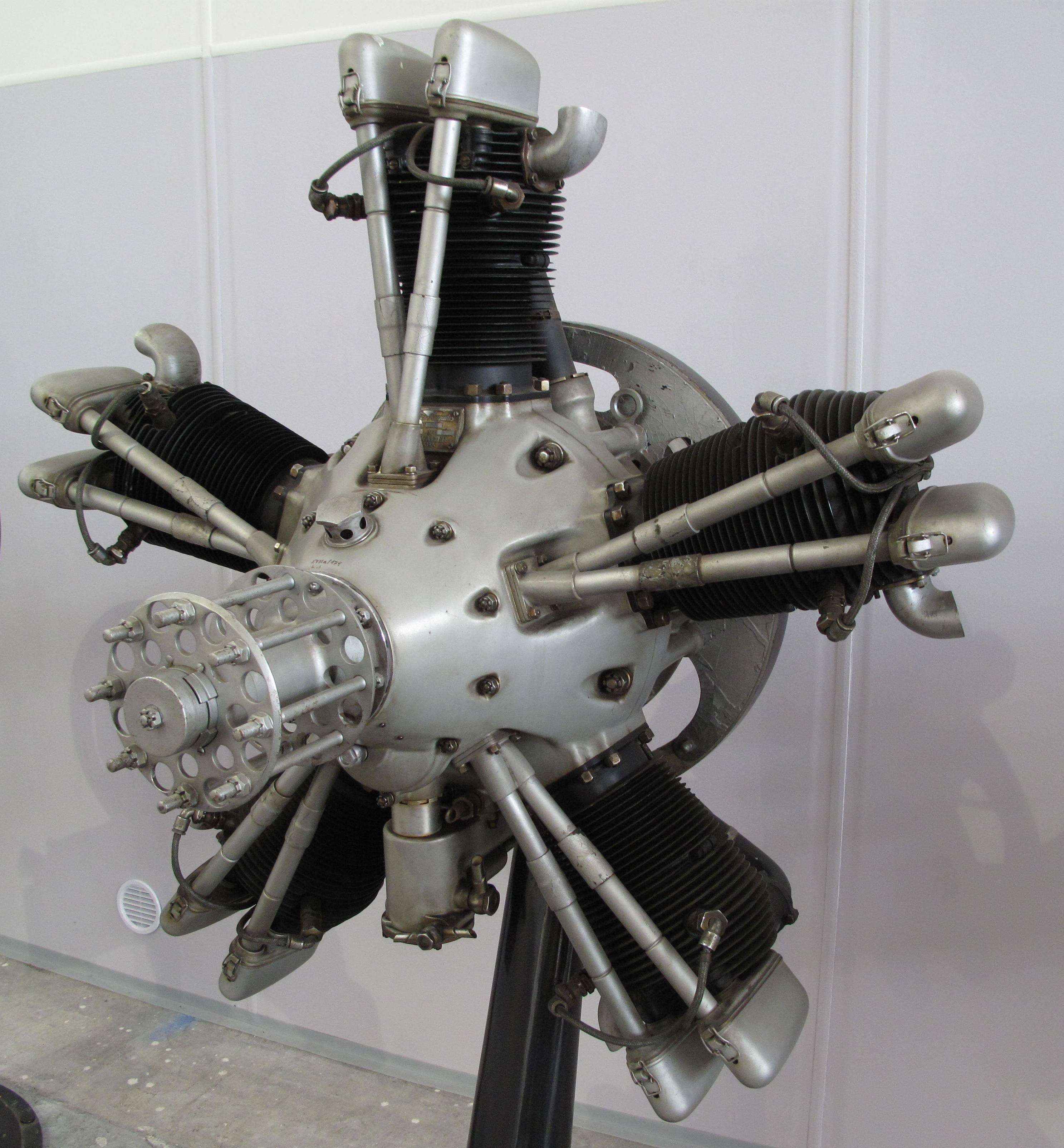 Letecké muzeum Kbely